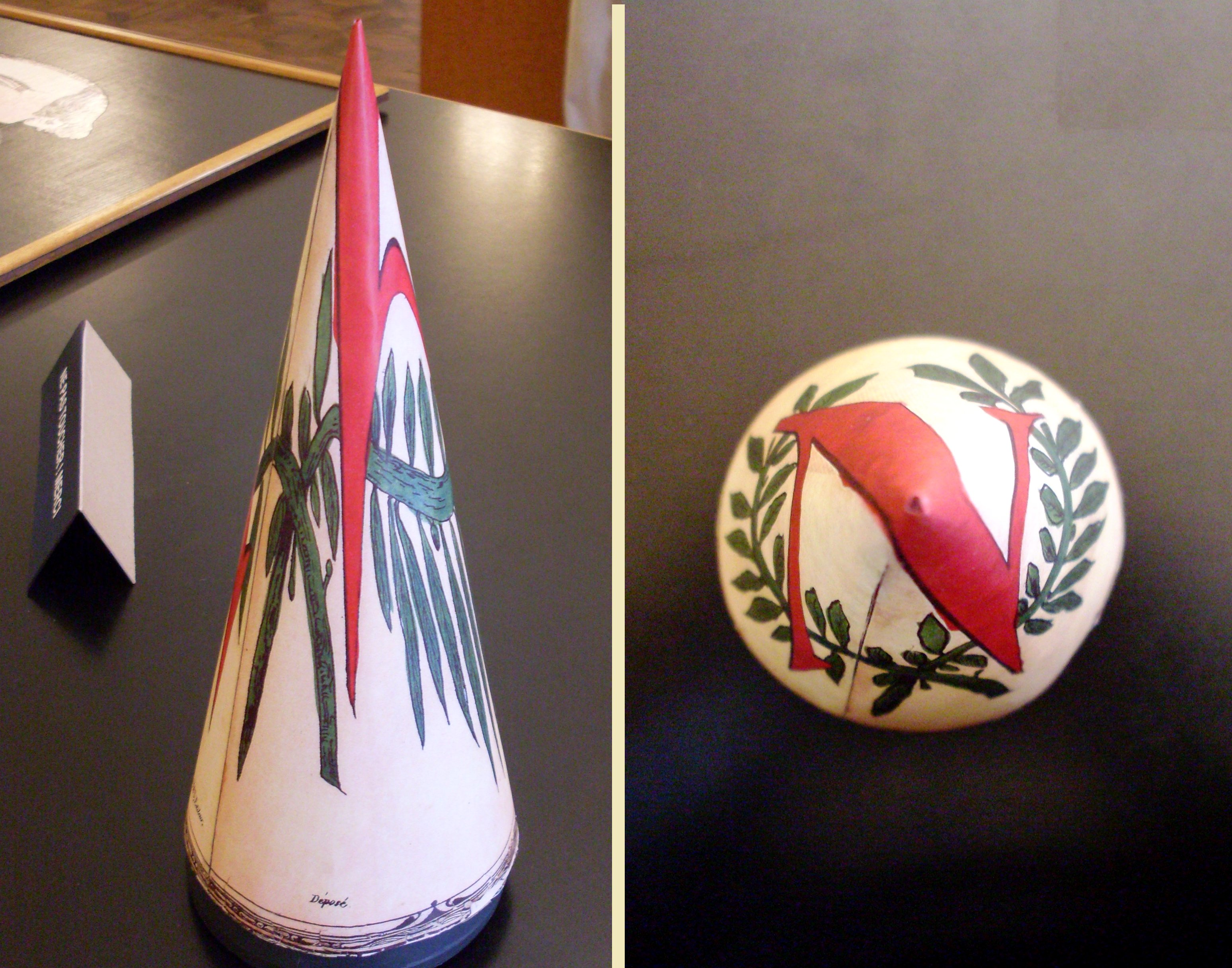 Anamorphose conique par V. Sies auteur éditeur, Paris, 1842 (collection particulière). Photos prises lors d’une exposition à la préfecture de Toulouse en septembre 2010 réalisée par les Machines du Fantasmagore